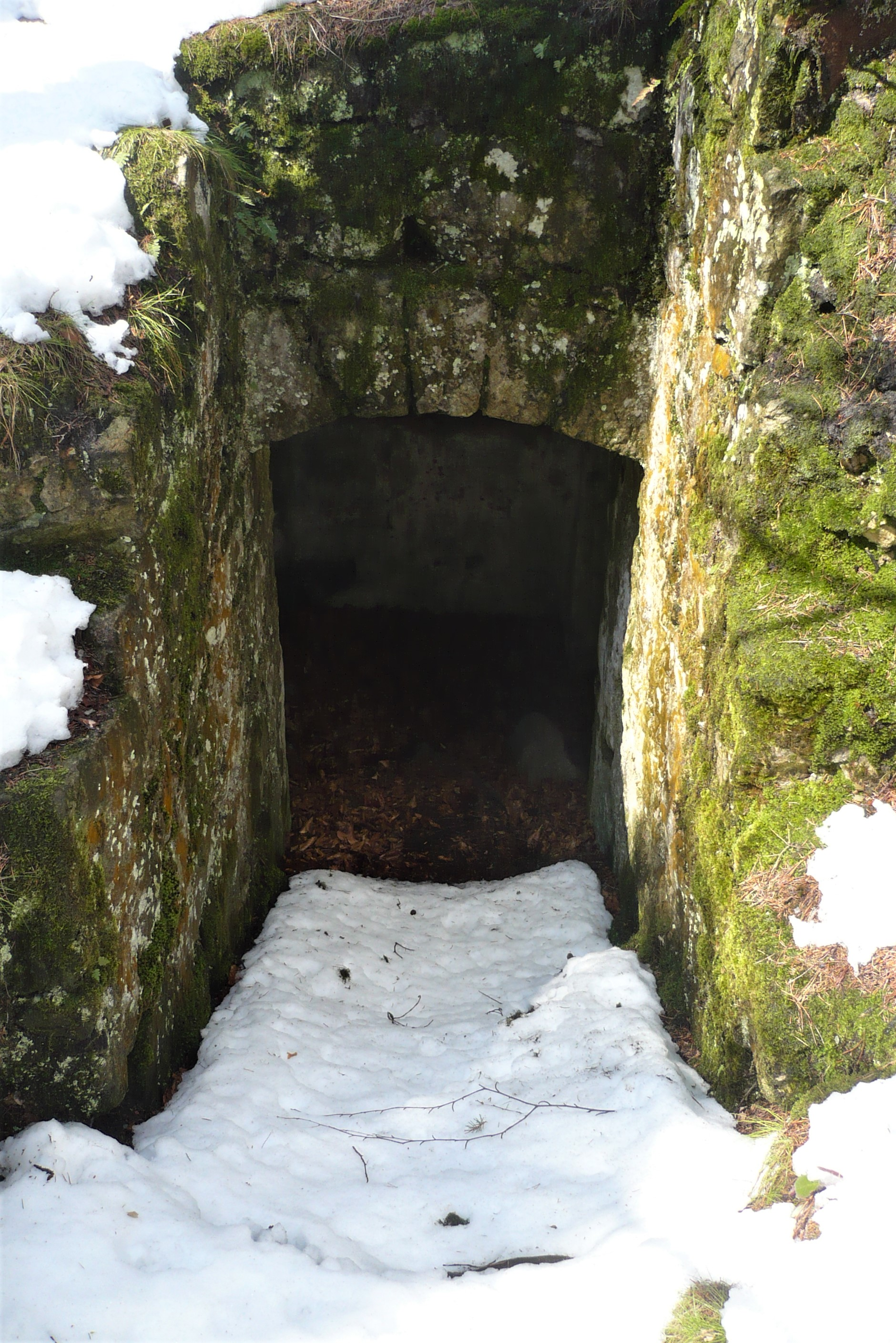 Kamienna Góra (Góry Bystrzyckie). Fort Fryderyka